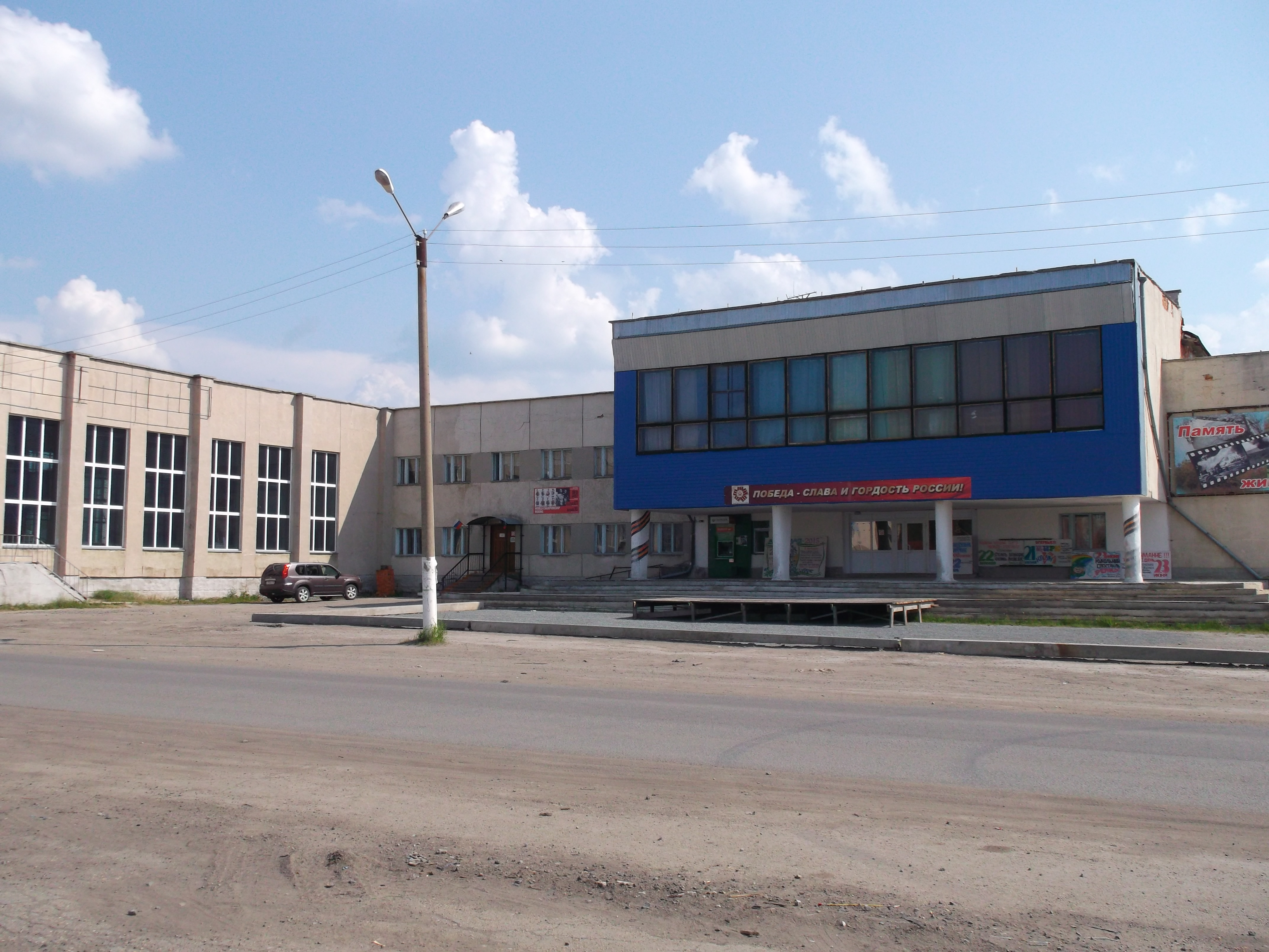 пос. Мишкино